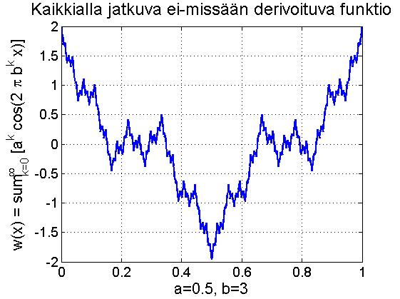 Esimerkki kaikkialla jatkuvasta ei-missään derivoituvasta funktiosta